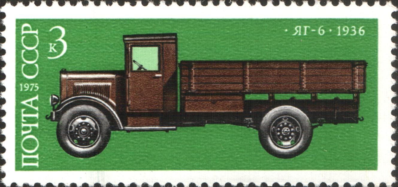 Грузовой автомобиль ЯГ-6. 1936 г. Художник: А. Коврижкин. Марка СССР 1975г., номинал - 3коп.